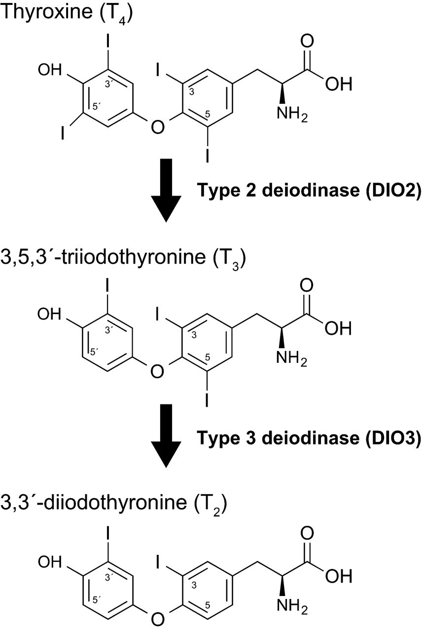 La tiroxina (T4), el precursor de la hormona tiroidea, se convierte en la forma activa, 3,5,3′-triyodotironina (T3 ), por desyodación en la posición 5 'mediada por DIO2. DIO3 inactiva T3 liberando el yodo C-5 para formar el T2.